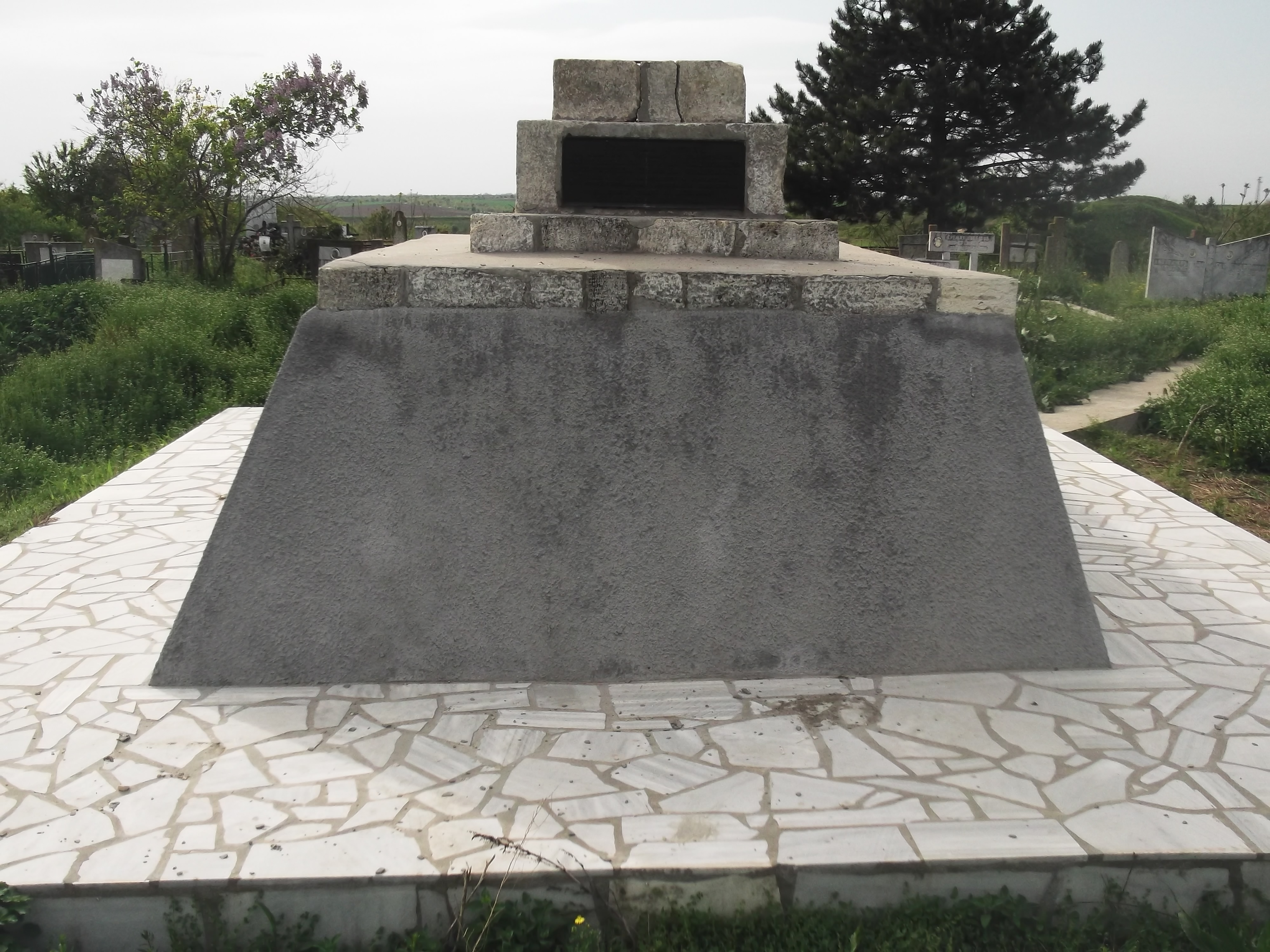 Братска могила на 12 нижни чина и 1 артилерист 5 бригада загинали край Долна Митрополия на 10.12.1877 г.